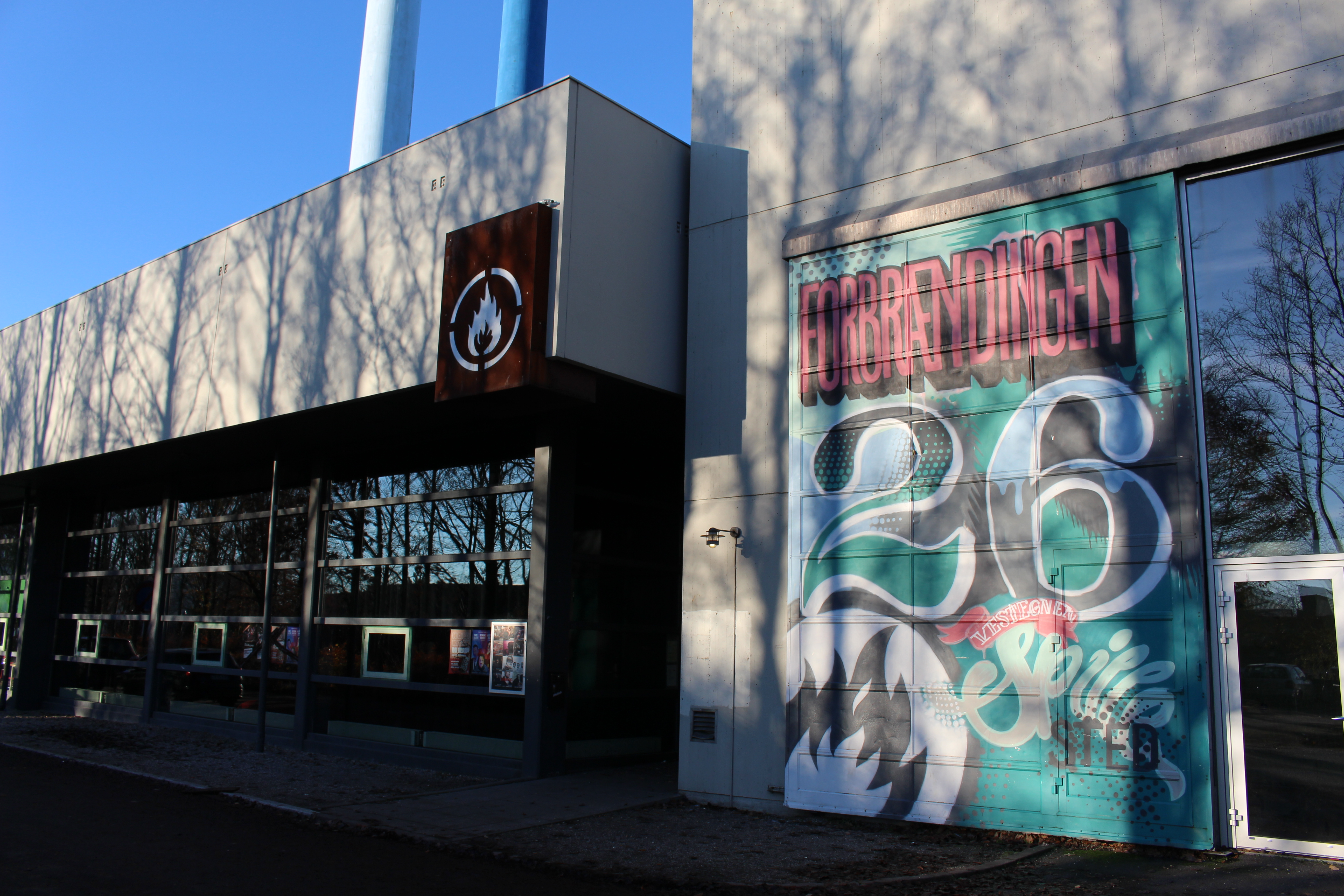 Forbrændingen i Albertslund